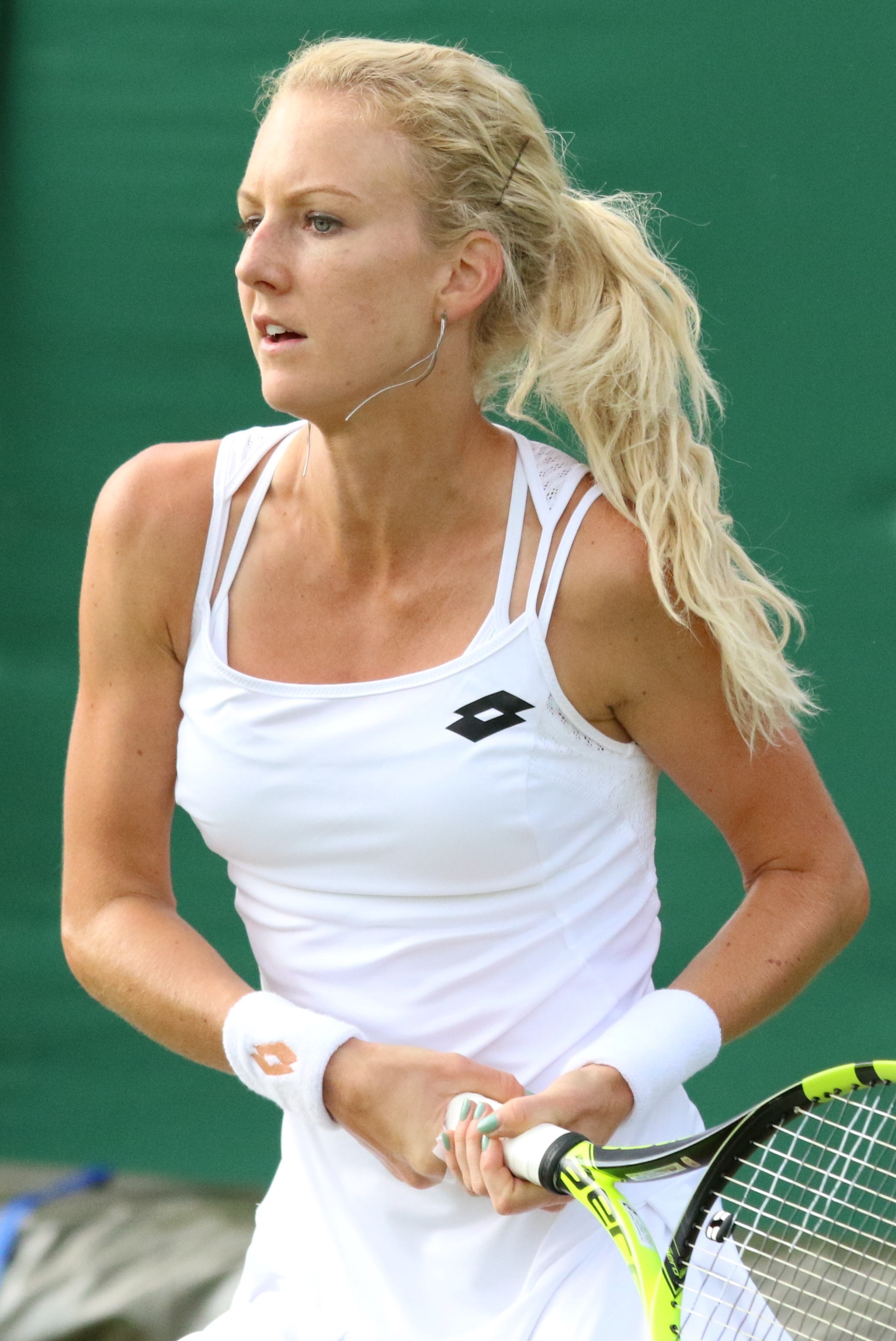 Radwanska U. WMQ16 (27)